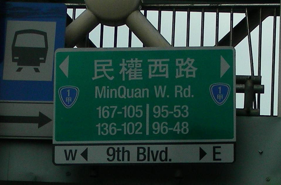 臺灣臺北市民權西路路名標誌。